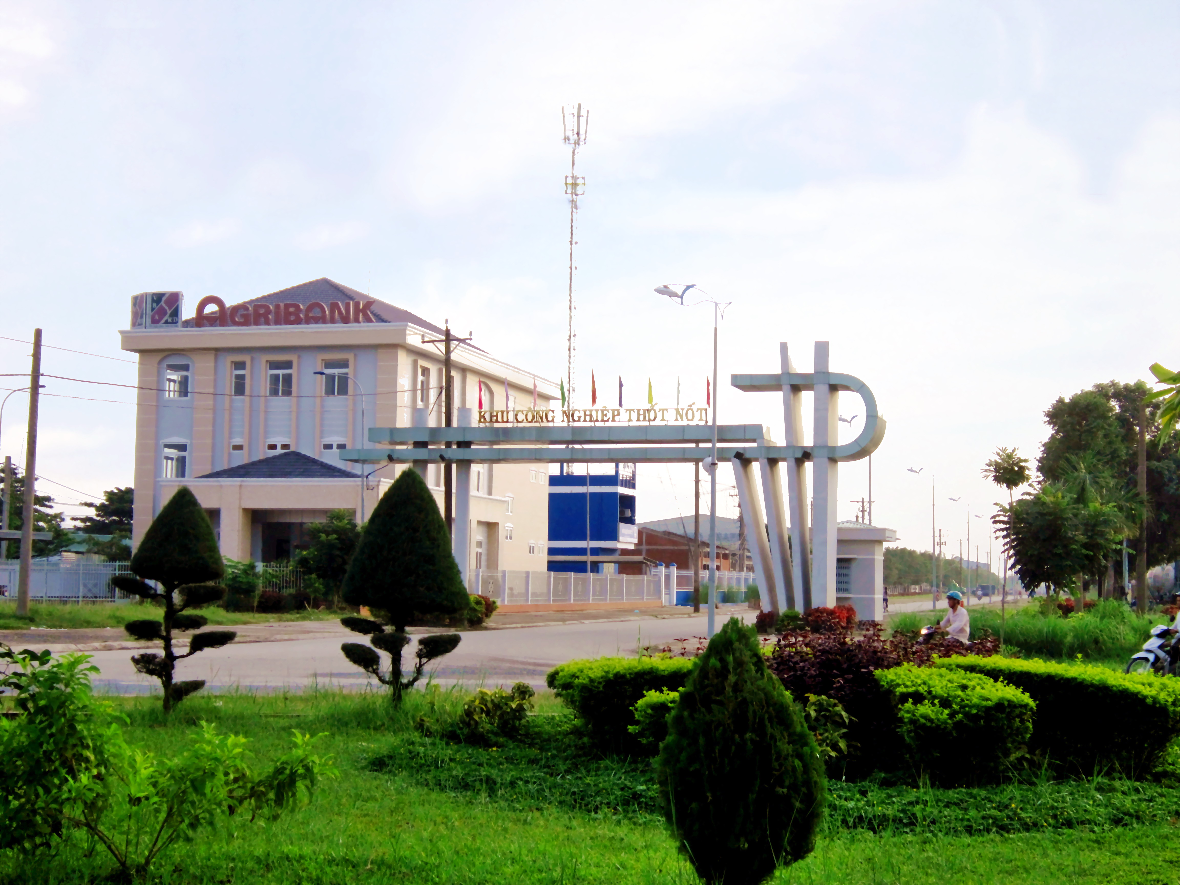 Cổng vào khu Công nghiệp Thốt Nốt, thuộc quận Thốt Nốt, thành phố Cần Thơ, Việt Nam.